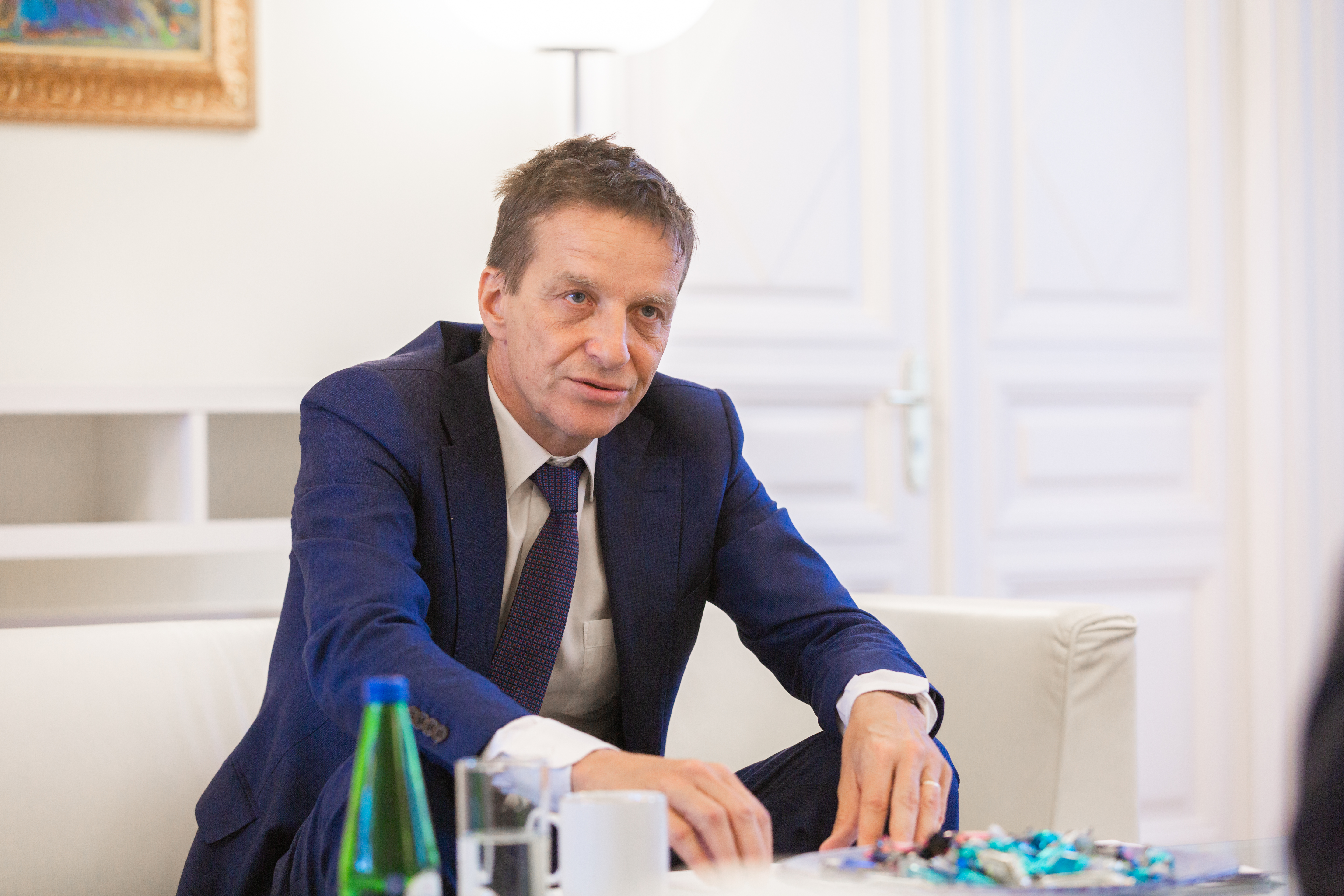 Ardo Hansson Stenbocki majas